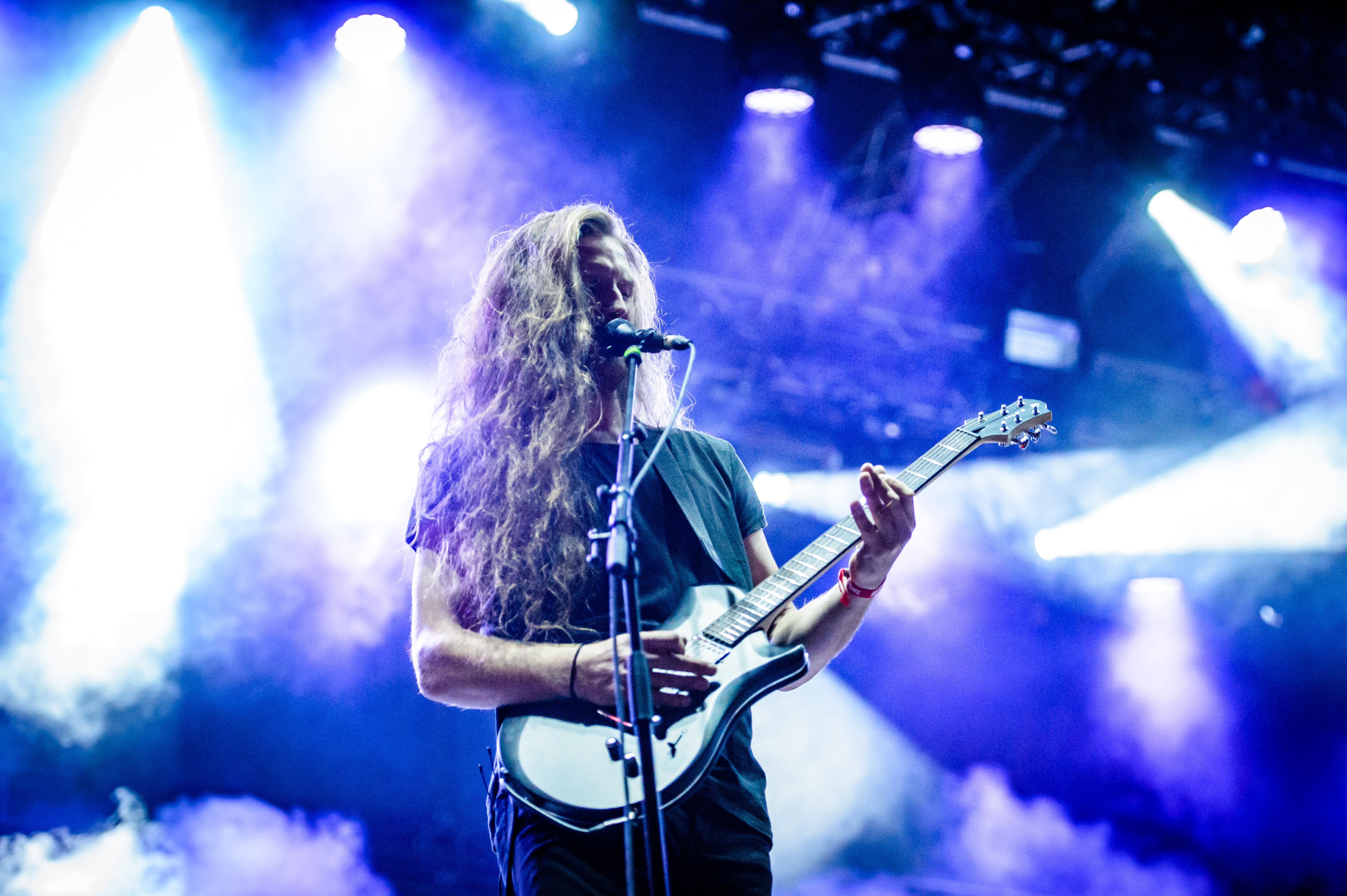 'RockHarz Open Air 2017; Ballenstedt': 'Alcest'